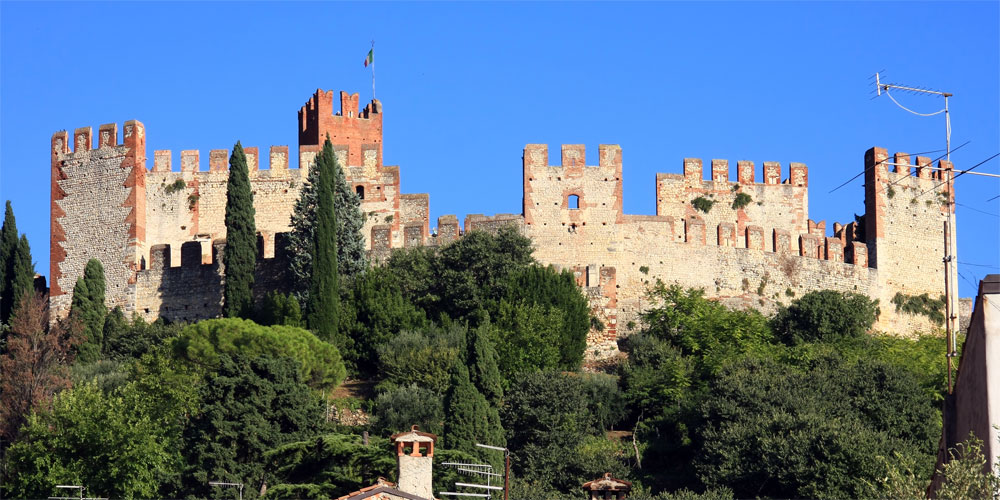 Il castello di Soave visto dall'abitato